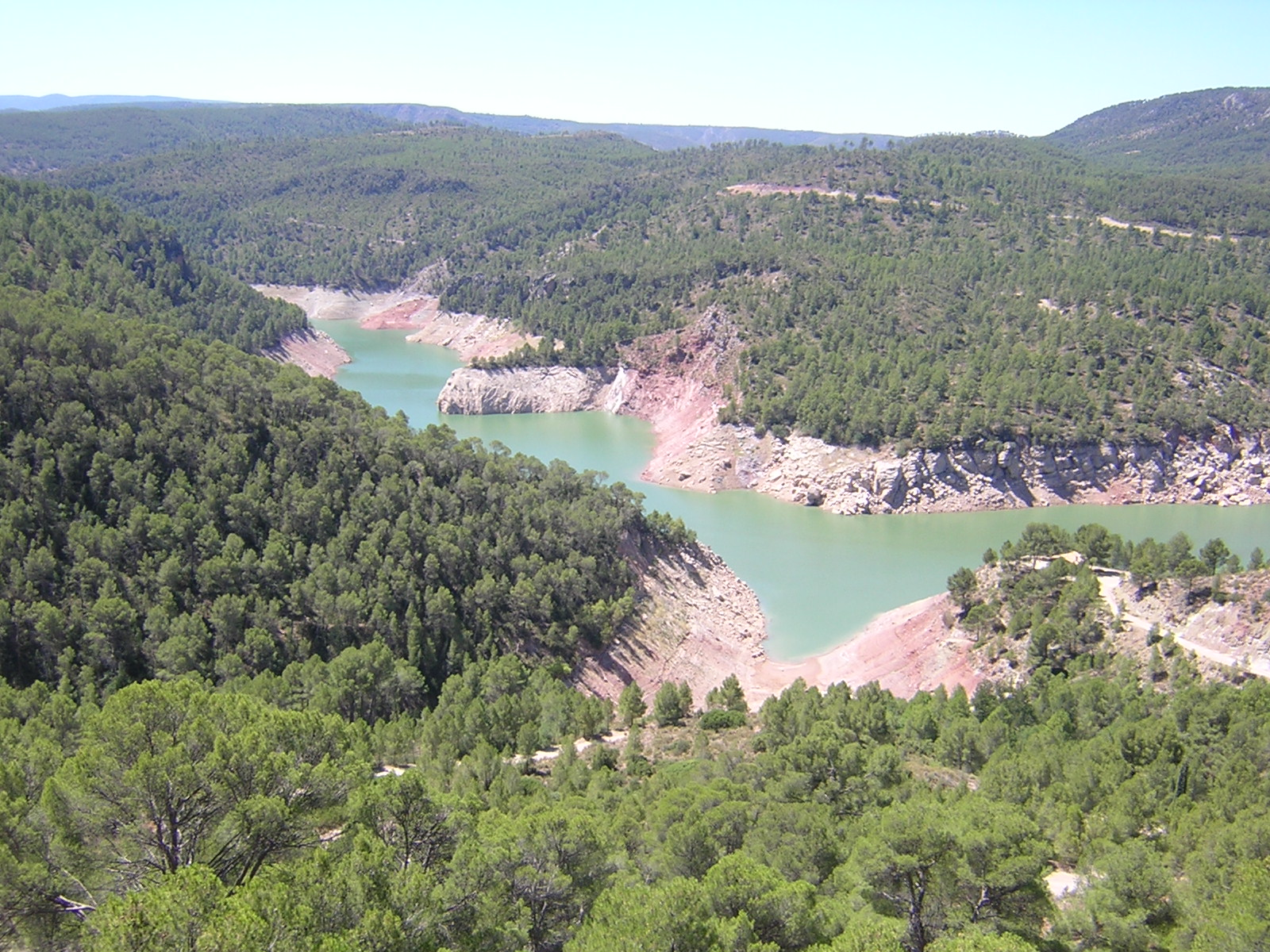 Foto de una pequeña parte del embalse de Benagéber.